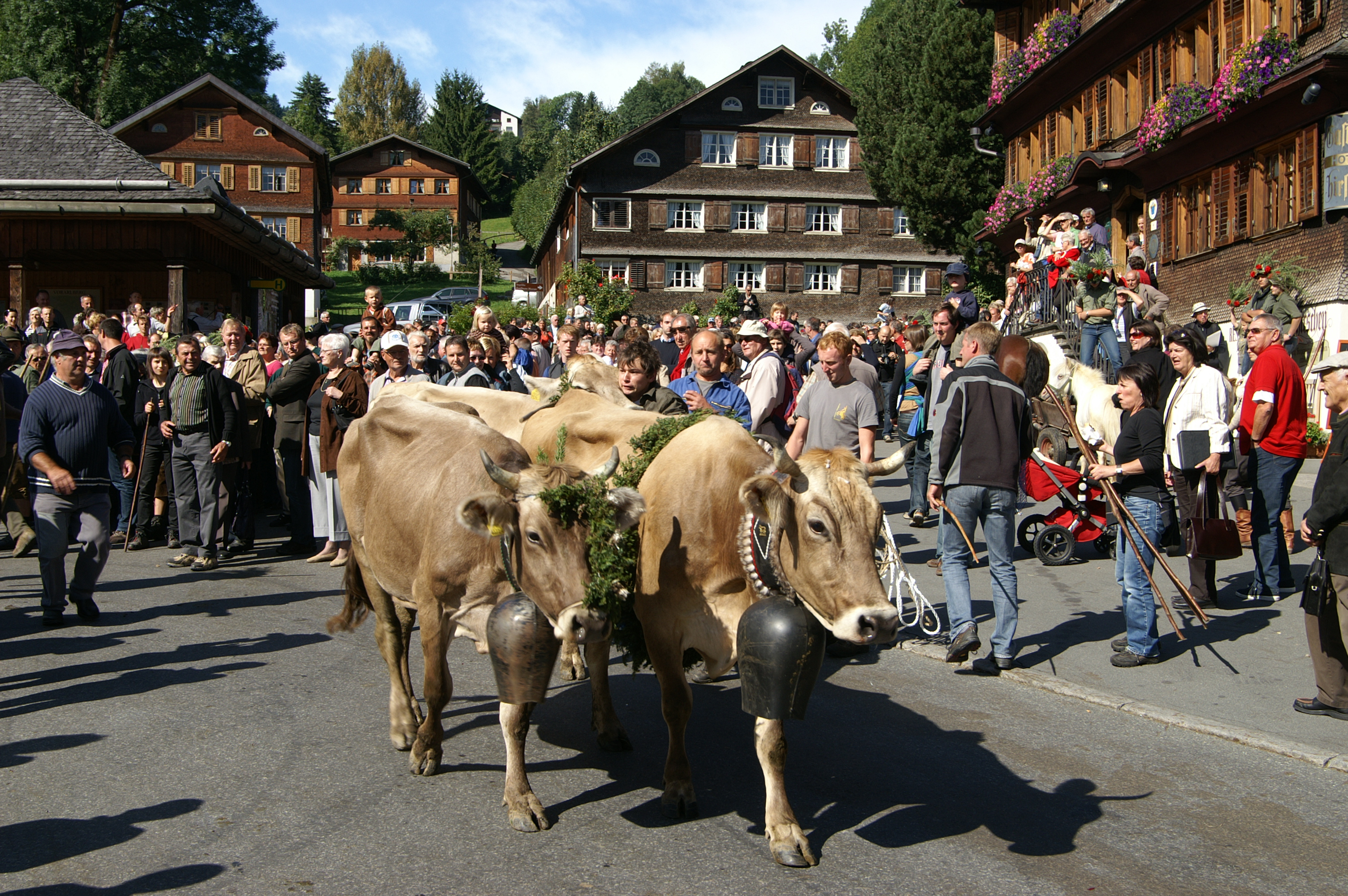 Der Schwarzenberger Alptag mit dem traditionellen Almabtrieb am 15.September.